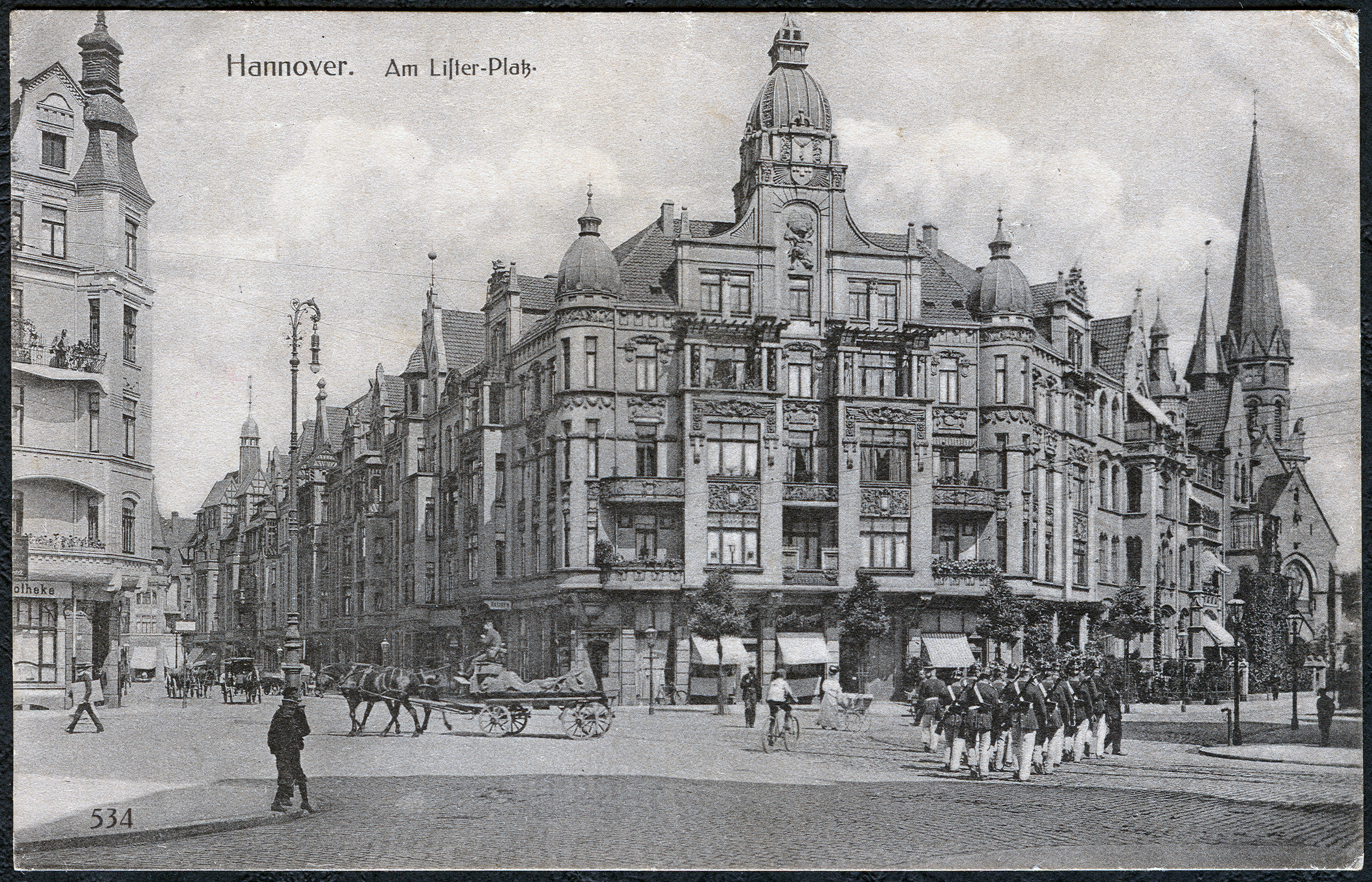 Ansichtskarte eines anonymen Fotografen mit der Nummer 534, betitelt "Hannover. Am Lister Platz." Zu sehen ist eine Frontal-Ansicht auf das während der Luftangriffe auf Hannover im Zweiten Weltkrieg zerstörte Gebäude "Lister Platz 1", das heute (Stand: Juni 2012) durch einen Neubau mit Arkaden ersetzt worden ist. Auf dem Bild mit Blick in die Podbielskistraße sowie in die Oskar-Winter-Straße mit der Markuskirche ist - neben einigen Kutschen und Gespannen, unter anderem eine Gruppe gemeinsam in Richtung Eilenriede marschierender Soldaten zu sehen, sowie am linken Bildrand die Apotheke im Eckgebäude zur Ferdinand-Wallbrecht-Straße.